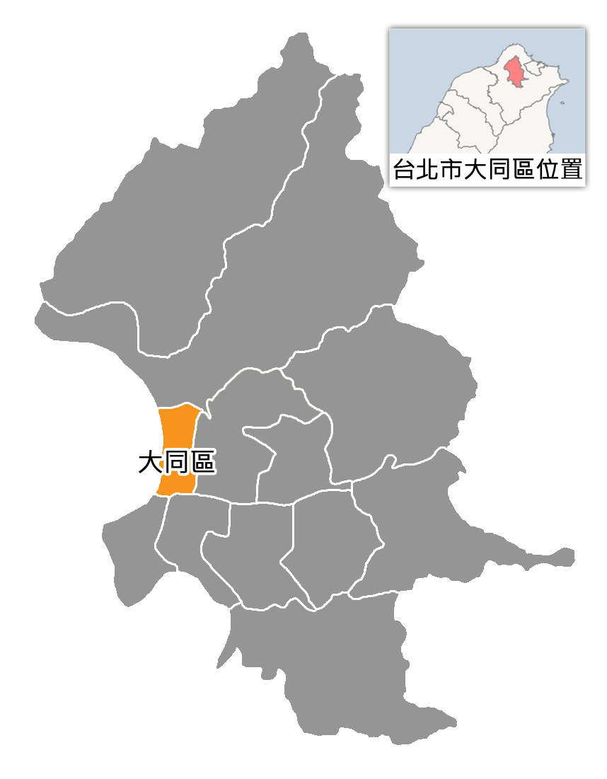 台北市大同區位置